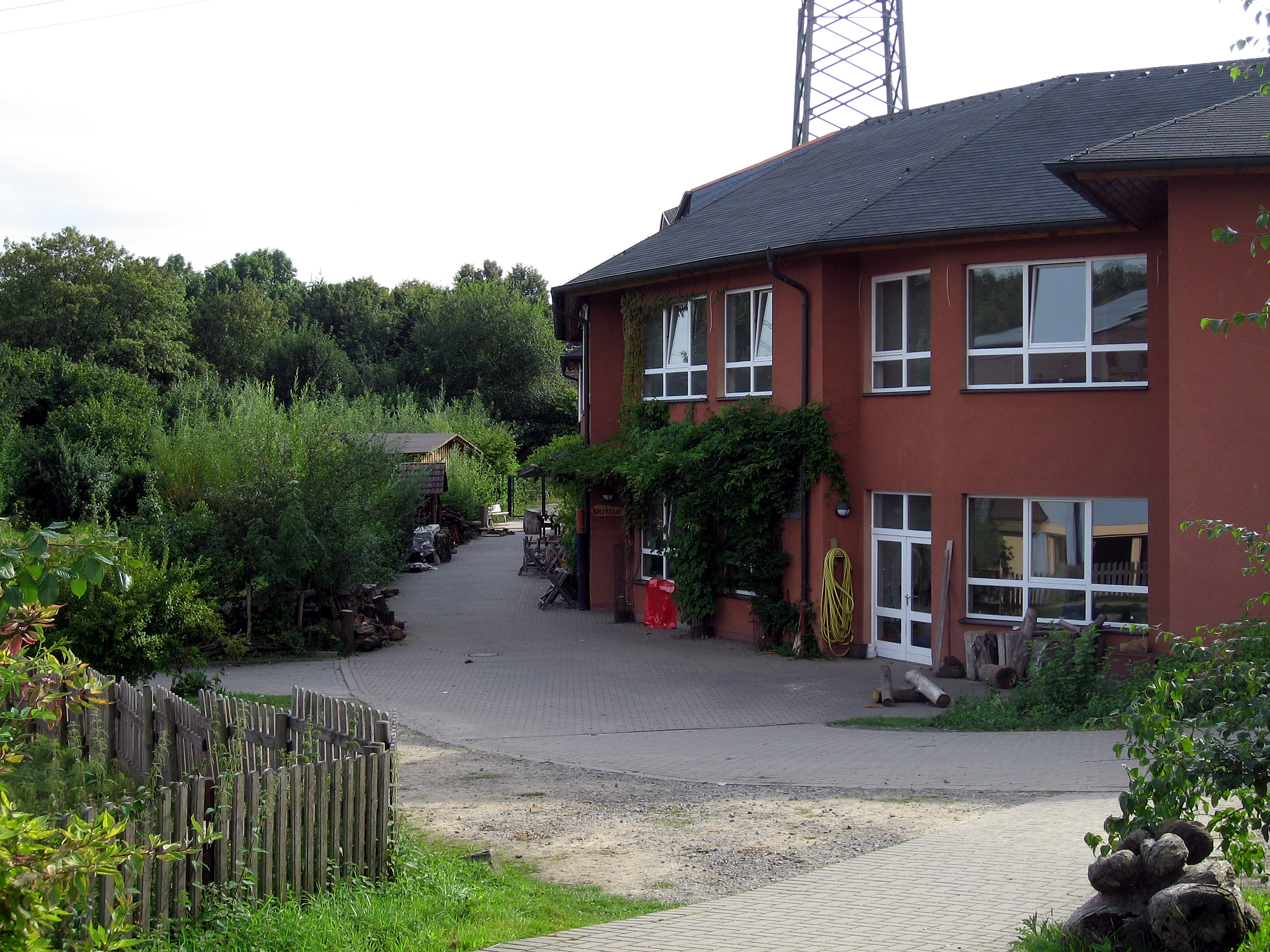 Dortmund, Brünninghausen, Anthroposophen, Architektur, Werkstätten